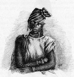 Ouolove de Saint-Louis (illustration de Côte occidentale d'Afrique du Colonel Frey, fig. 72, p. 112)